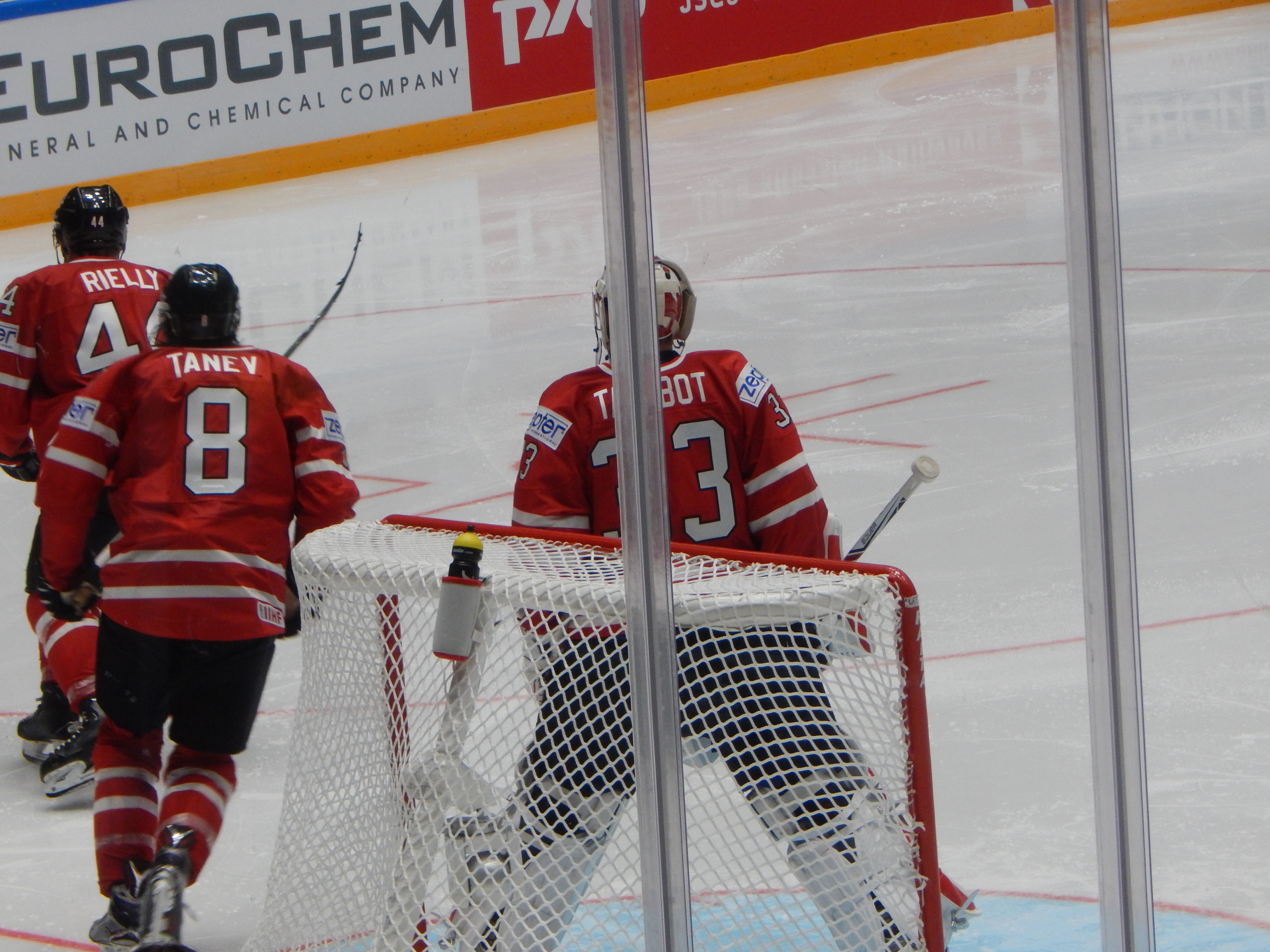 Морган Райлли, Крис Танев и Кэм Тальбо в матче открытия чемпионата мира по хоккею (Санкт-Петербург, матч против США, 6 мая 2016)